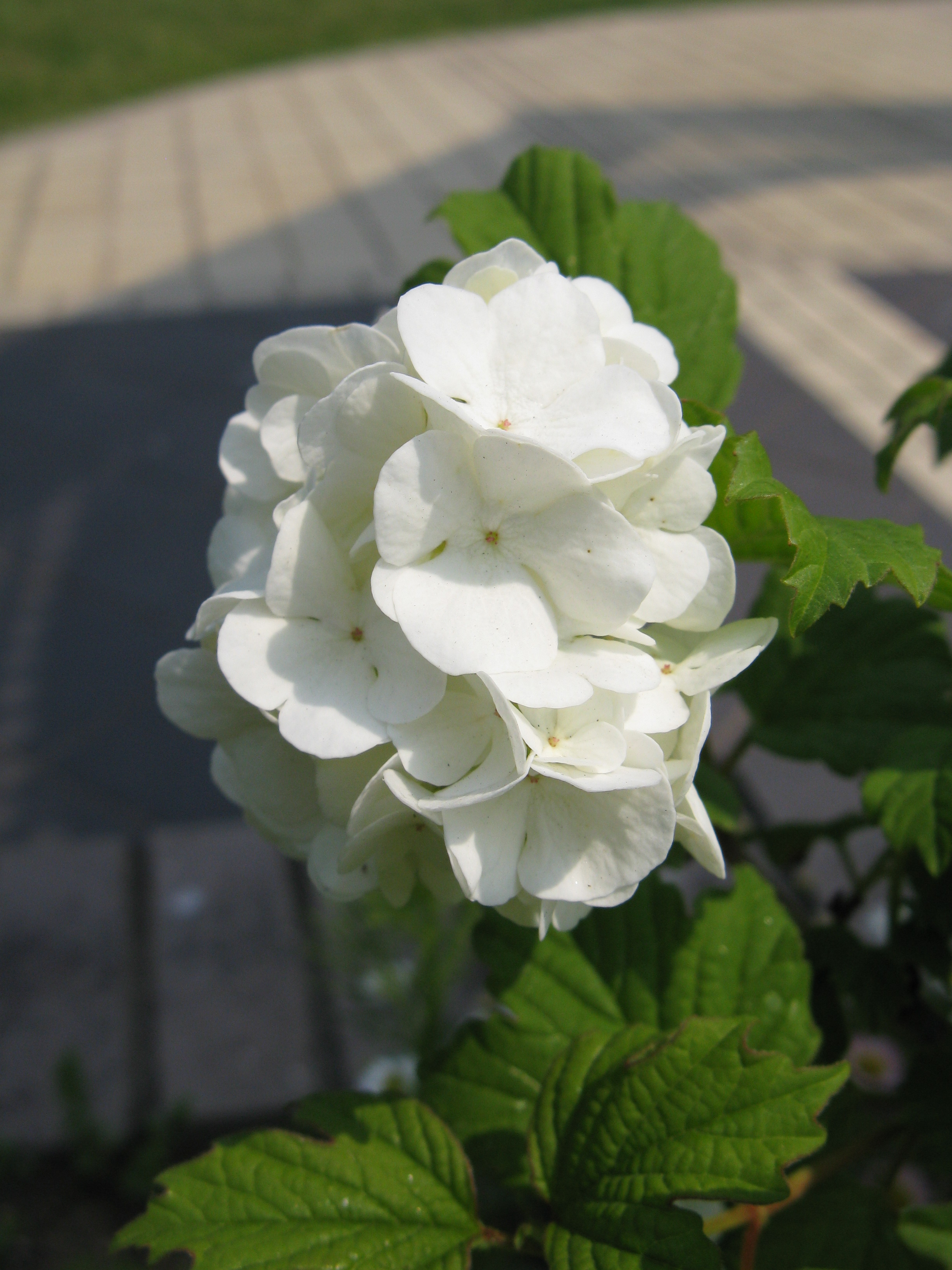 Viburnum opulus f. sterile